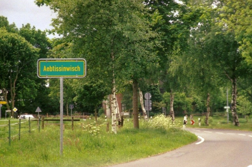 Ortshinweistafel (Zeichen 385) von Aebtissinwisch, Kreis Steinburg, Deutschland